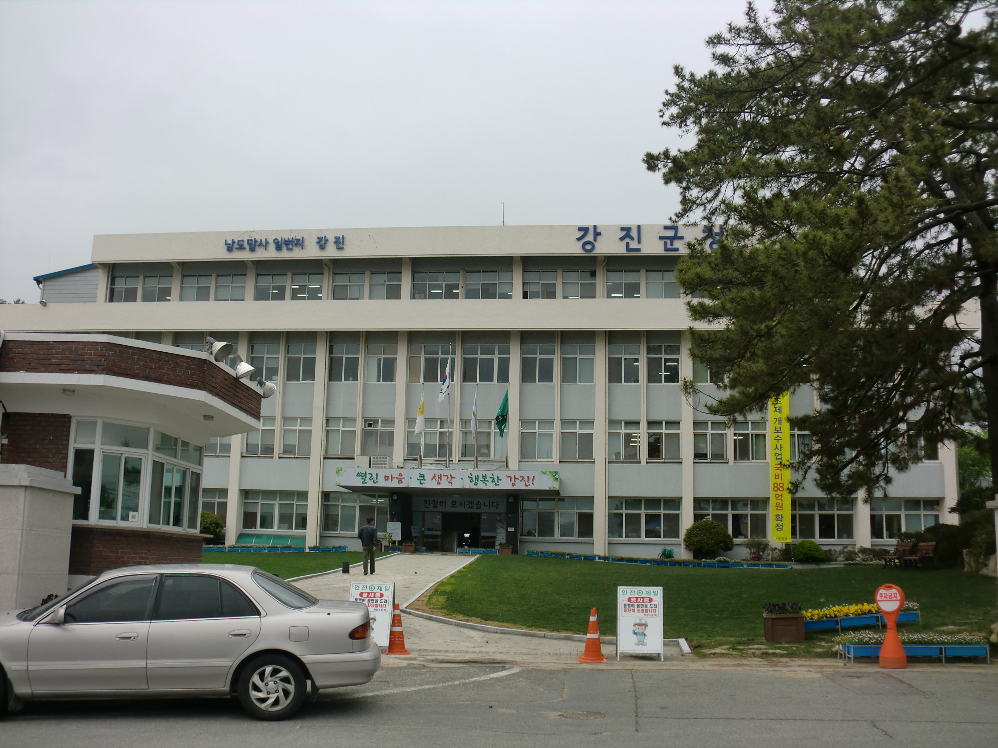 전라남도 강진군에 있는 강진군청